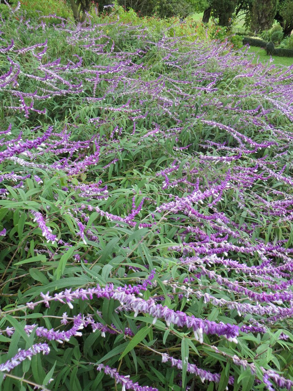 Quinta do Palheiro Ferreiro, Funchal - Madeira